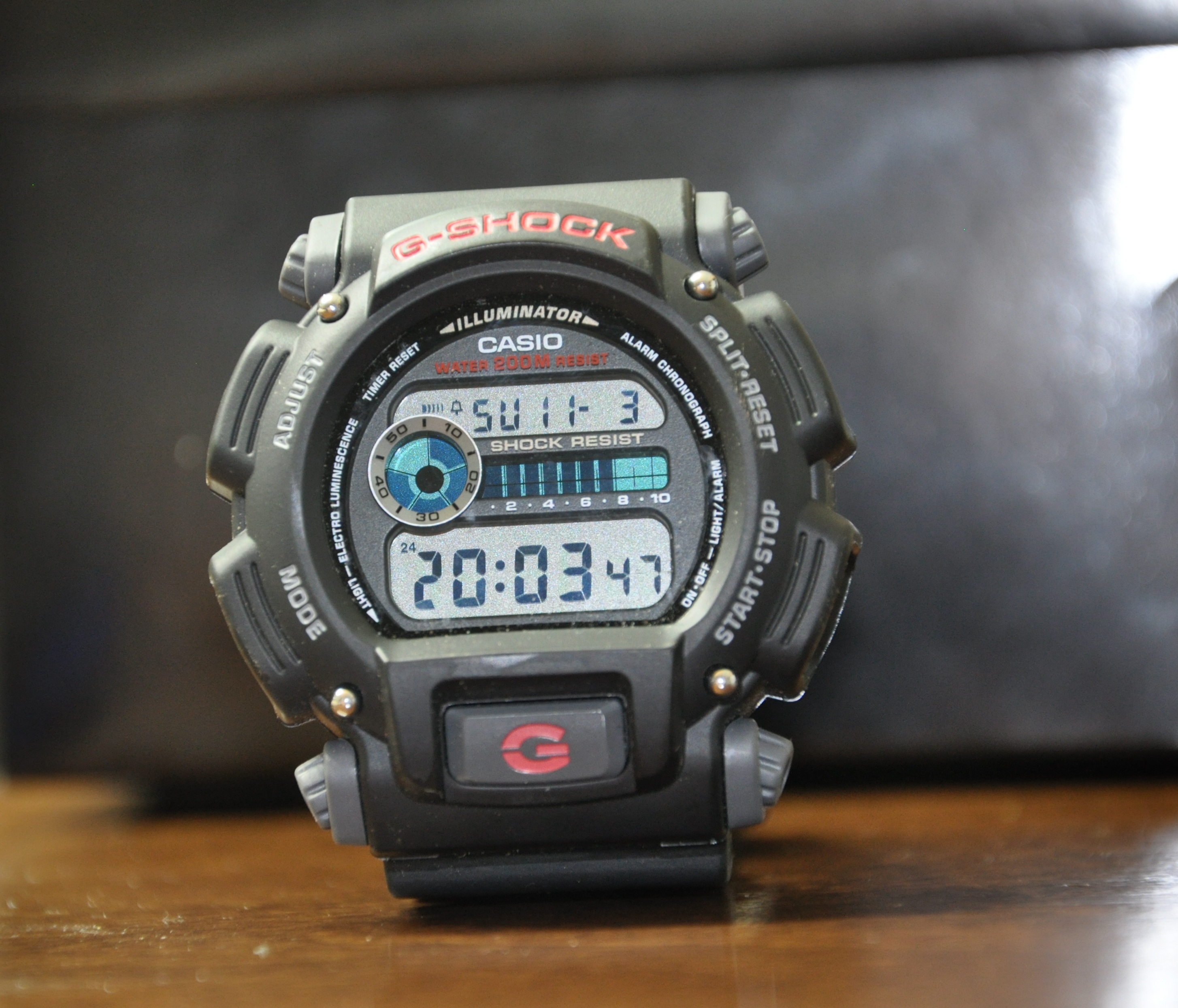 casio G-Shock DW9052